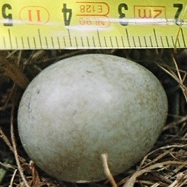 Foto di un uovo di merlo dentro il nido. Questa foto è stata scattata alla fine di aprile 2005, su un balcone di un condominio a Bolzano. Il nido è stato abbandonato il giorno prima dalla merla che vi aveva deposto complessivamente tre uova. L'abbandono è forse dovuto allo stress originato dalla presenza molto vicina di esseri umani. Una foto del nido si trova in file:Merlo-NidoConUovo.jpg